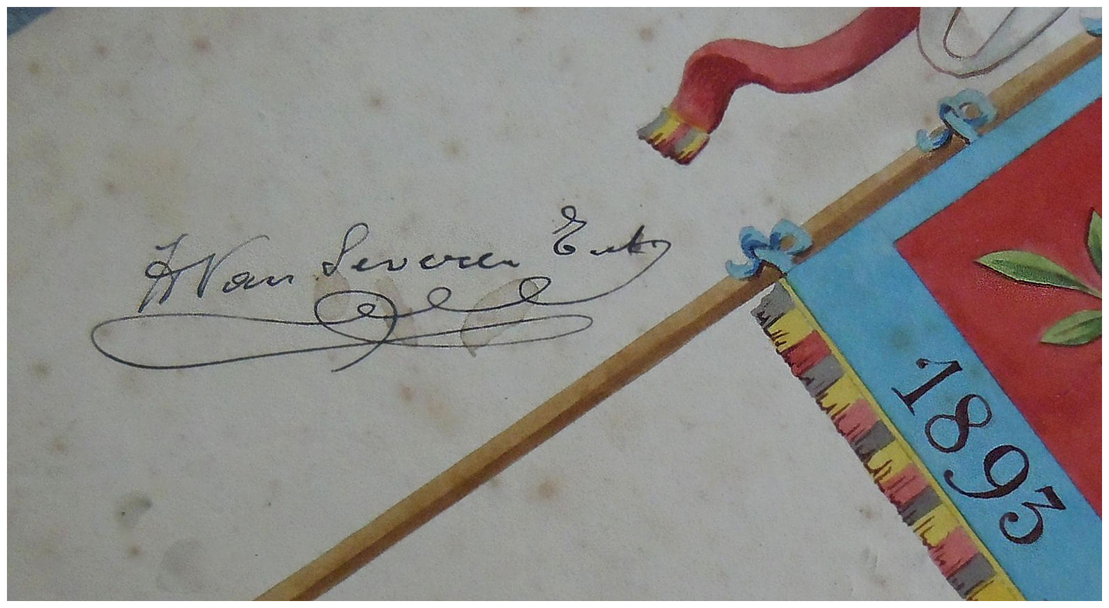 H. van Severen, Sint-Niklaas Vlagontwerp met signatuur 1893